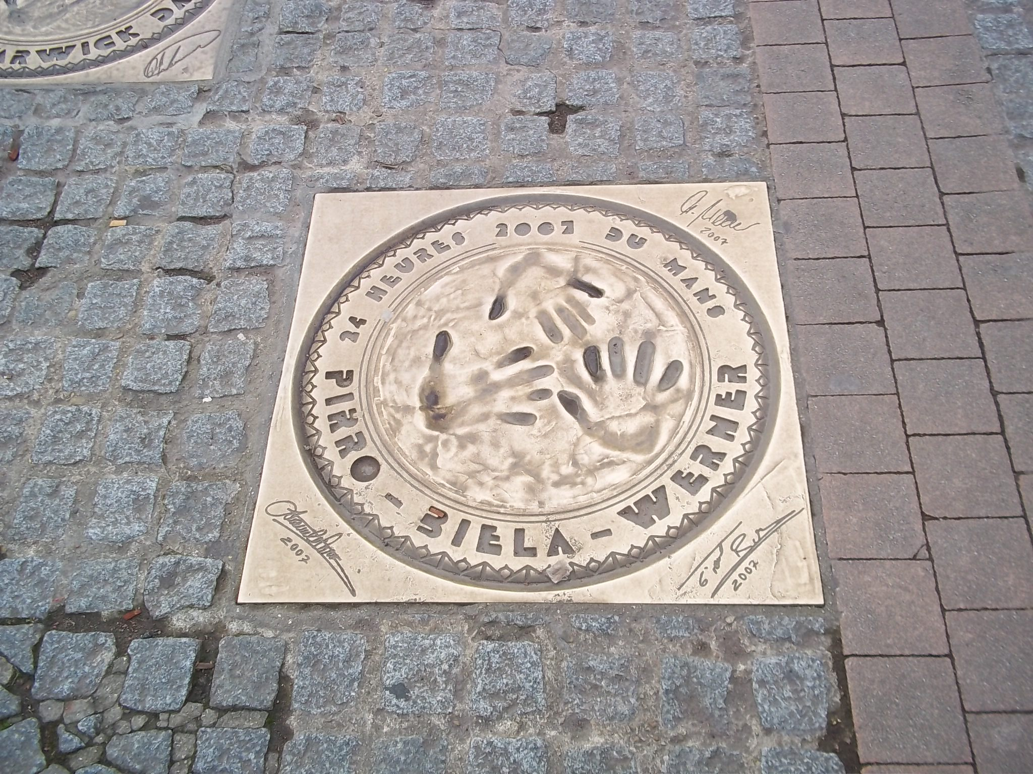 Plaque de bronze des empreintes des vainqueurs des 24 heures 2007